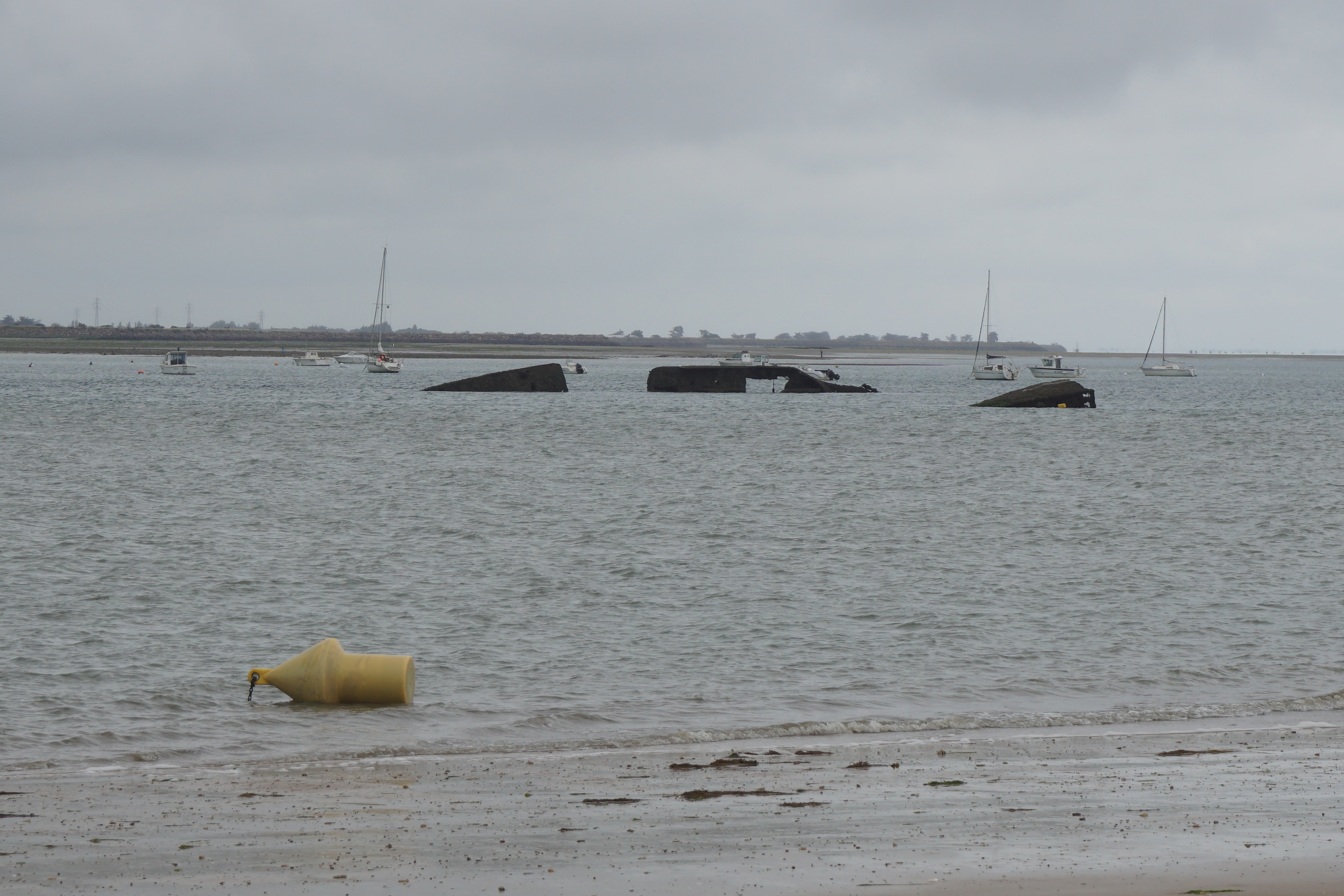 Fromentine (85) - Épaves deuxième guerre mondiale, navires "4as", dragueurs de mines allemands.